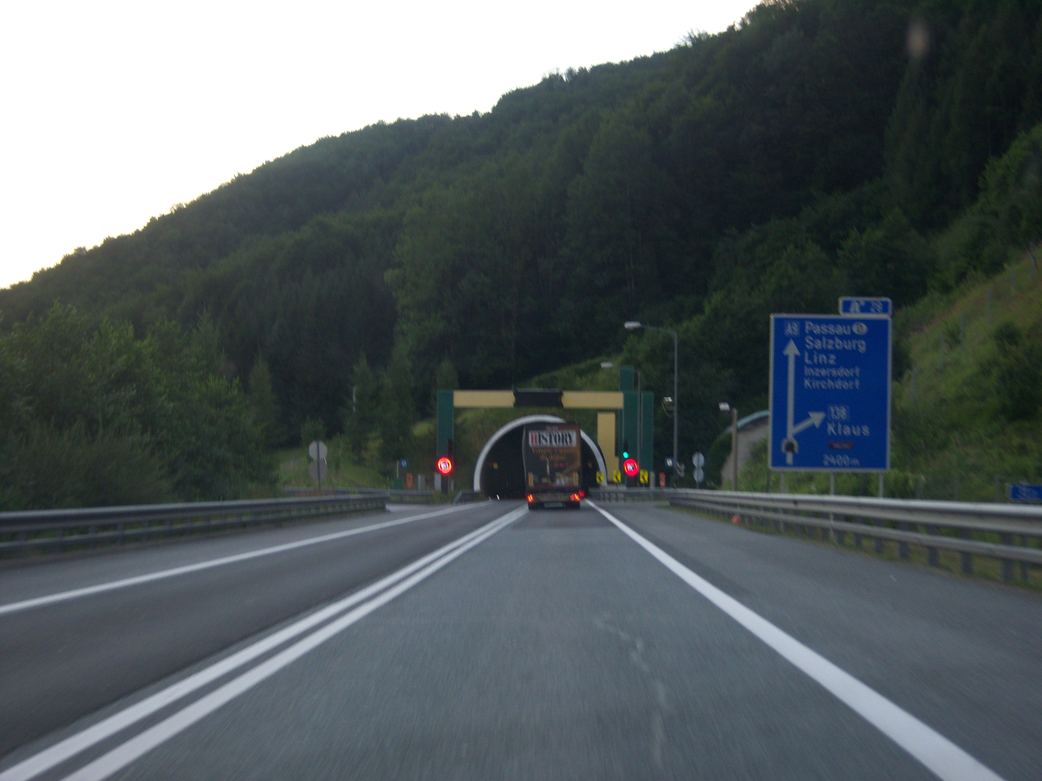 Pyhrn Autobahn A9 Richtung Voralpenkreuz vor dem Klauser Tunnel (Tunnelkette Klaus)